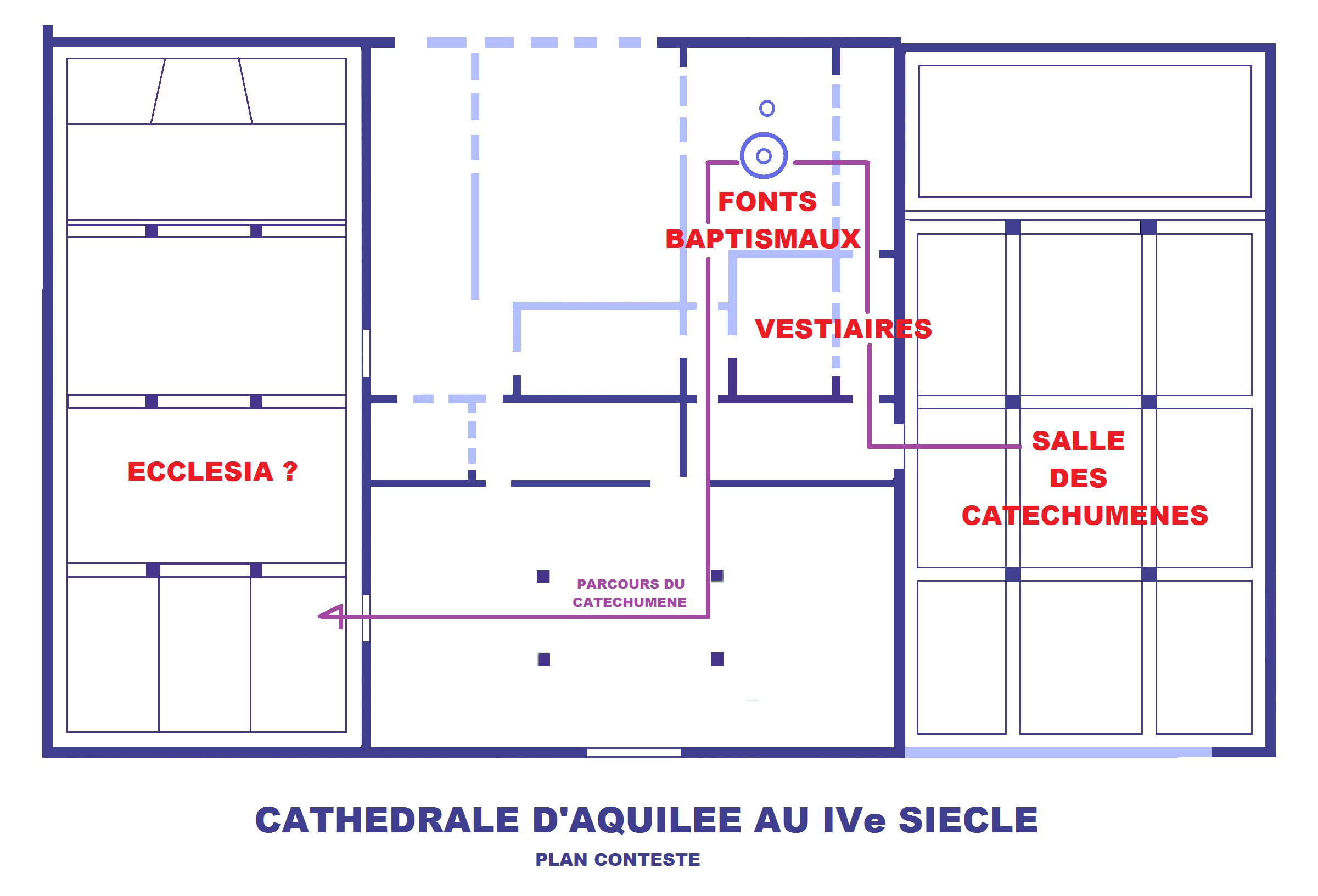 Cathédrale d'Aquilée, Plan au IVe siècle